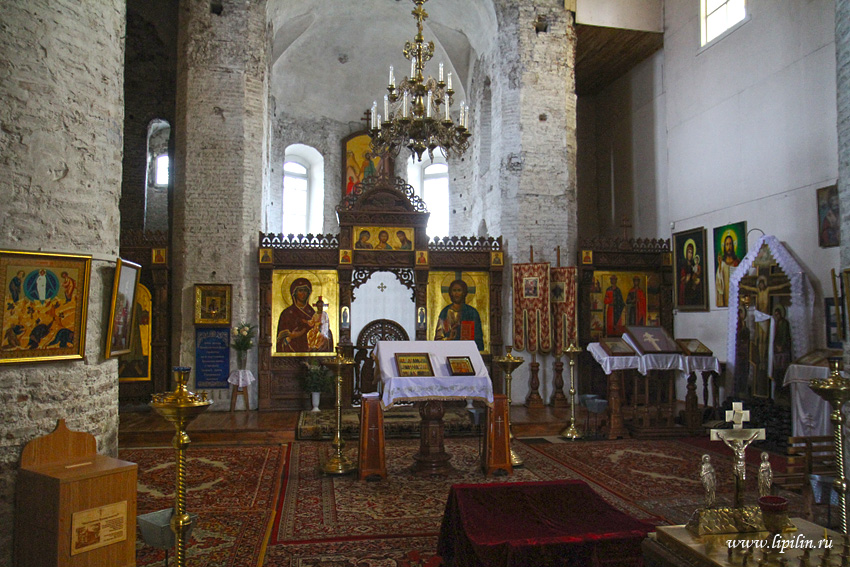 Гродна. Інтэр'ер Каложскай царквы